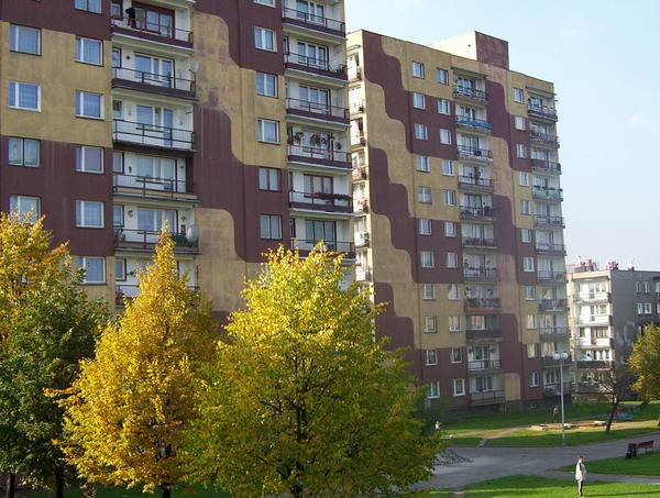 Ruda Sląska (Godula) - bloki